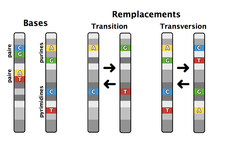 remplacement, substitution, transversion, transition, mutation, génétique, paire de bases, chromosome, purine, pyramidine